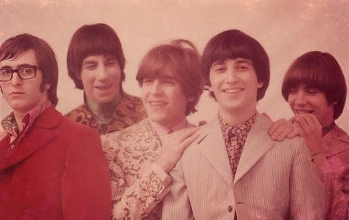 Los Gatos